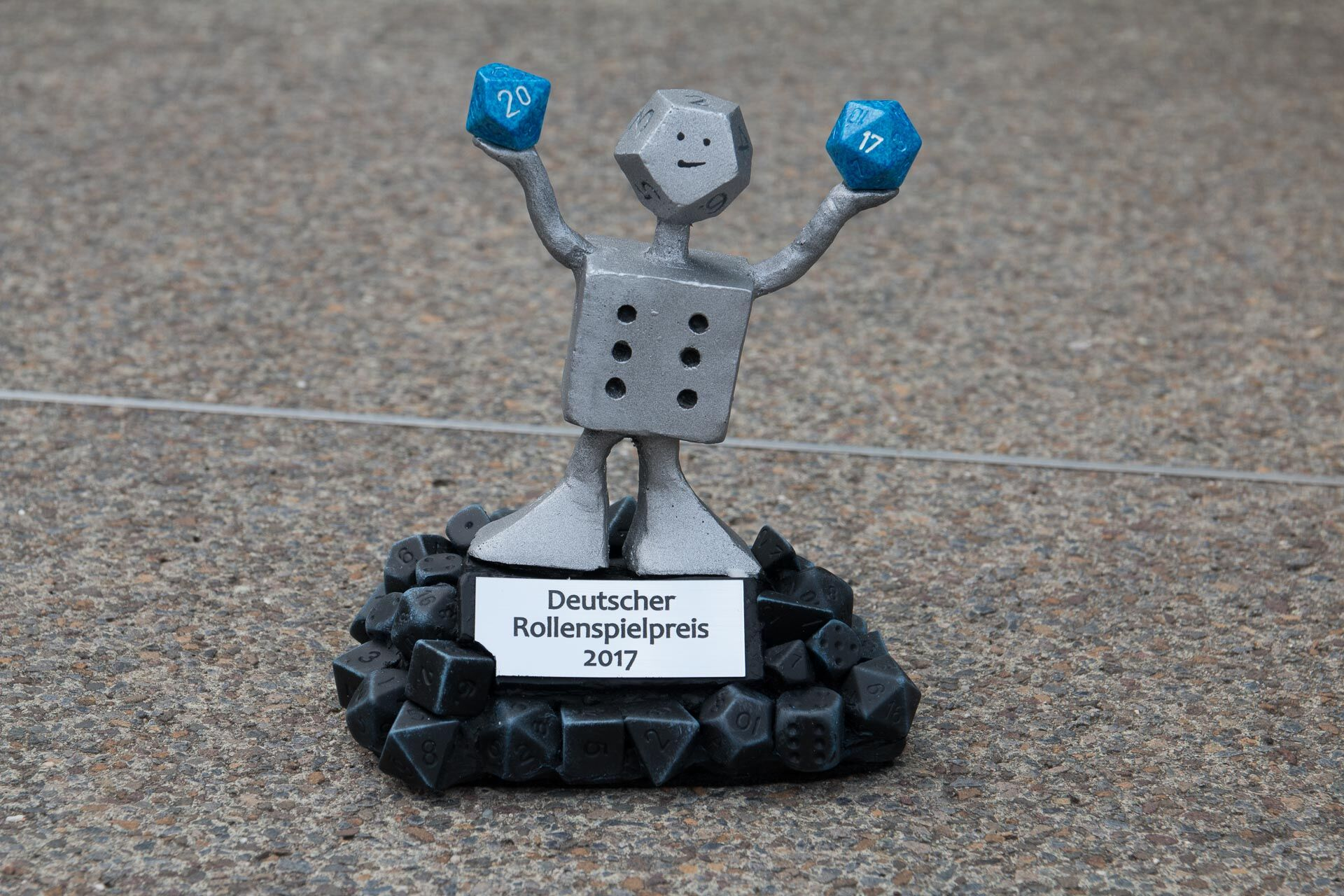 Der Würfelgolem ist die Preisstatue des Deutschen Rollenspielpreis. Er ist aus im Rollenspiel verwendeten Würfeln zusammengesetzt, die 20-seitigen Würfel in seiner Hand geben das Jahr der Verleihung wieder.